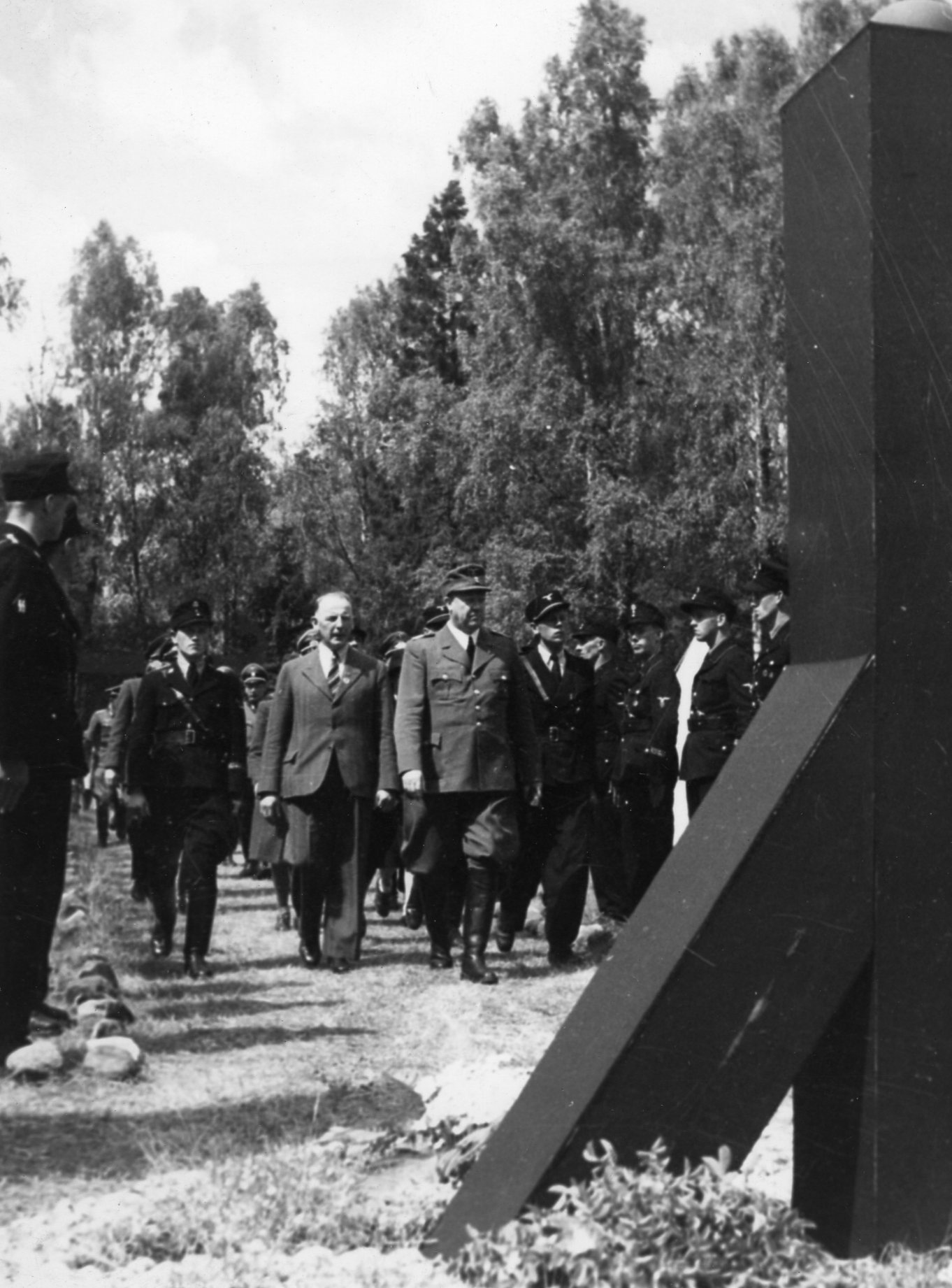 RA/RAFA-3309/U 38A/ 3/38-3-3 img121